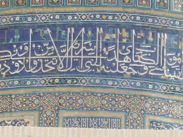 Détail du tambour sous une des coupoles de la madrassah Mir-i Arab